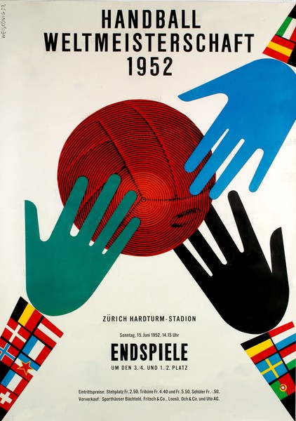 Plakat der Feldhandball-Weltmeisterschaft der Herren 1952